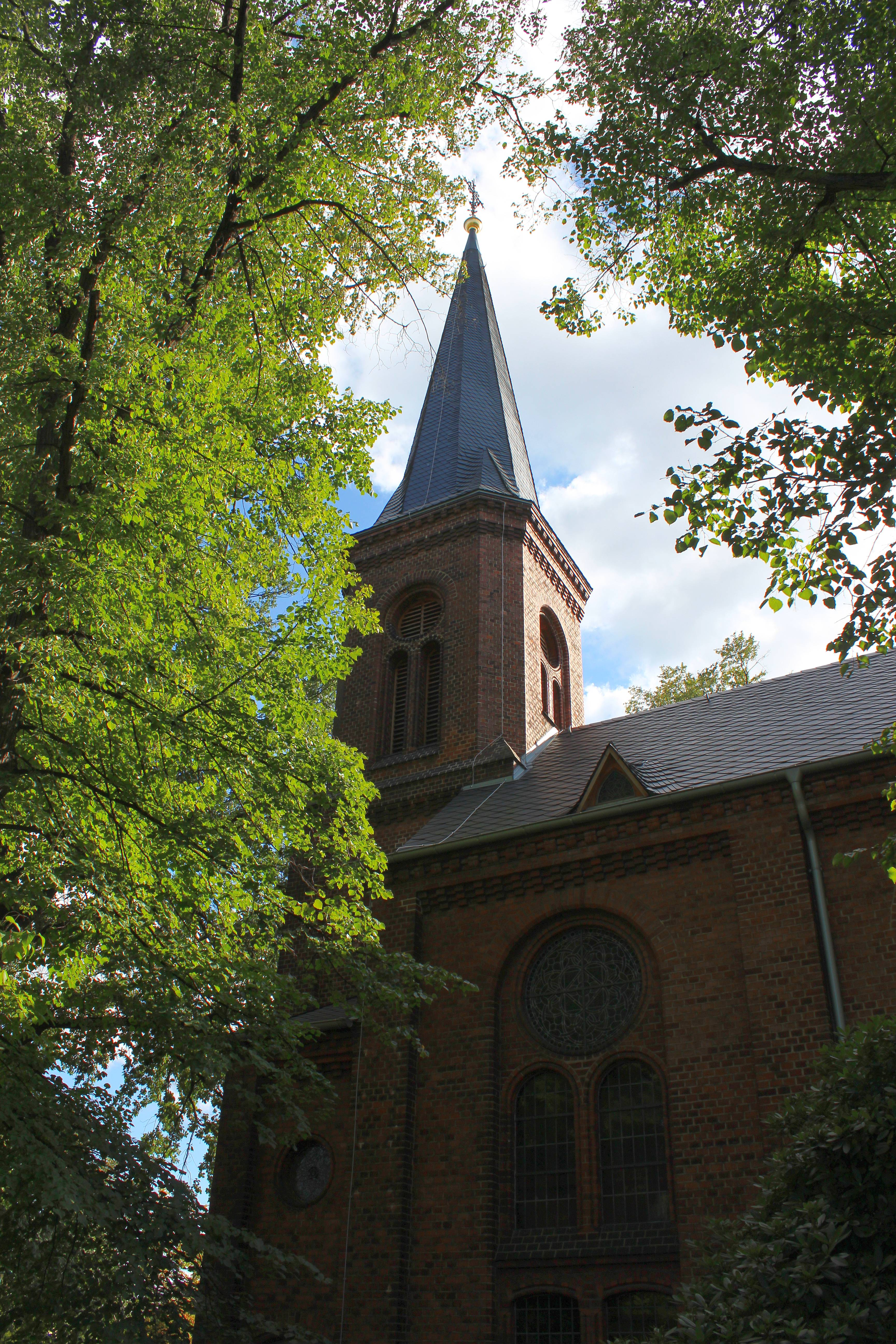 Kirchturm der Evangelischen Kirche in Gröditz.